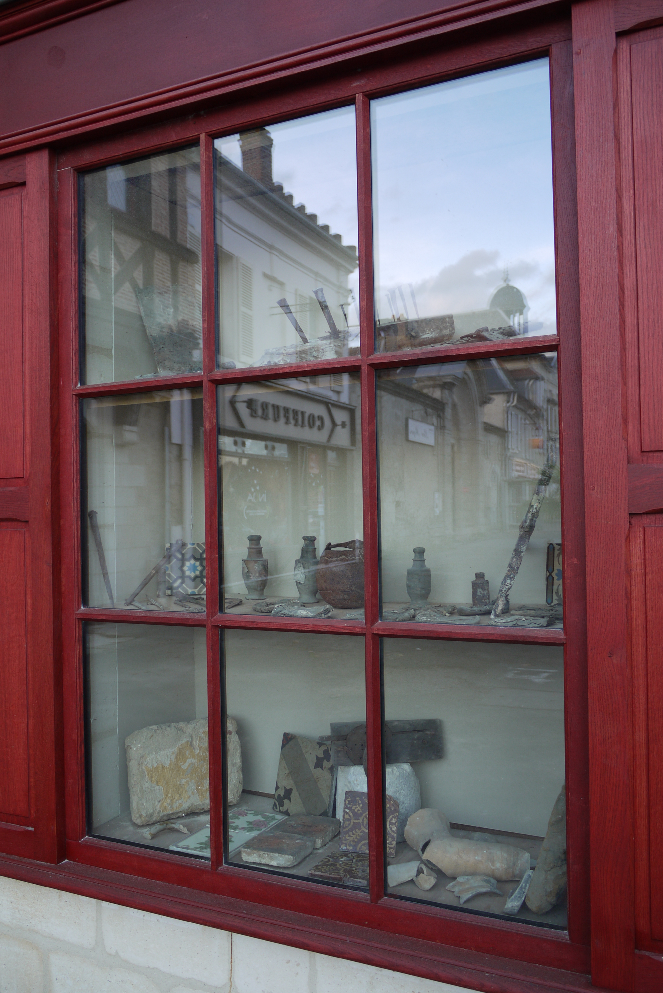 Une vitrine de la maison à colombages de Braine (Aisne)